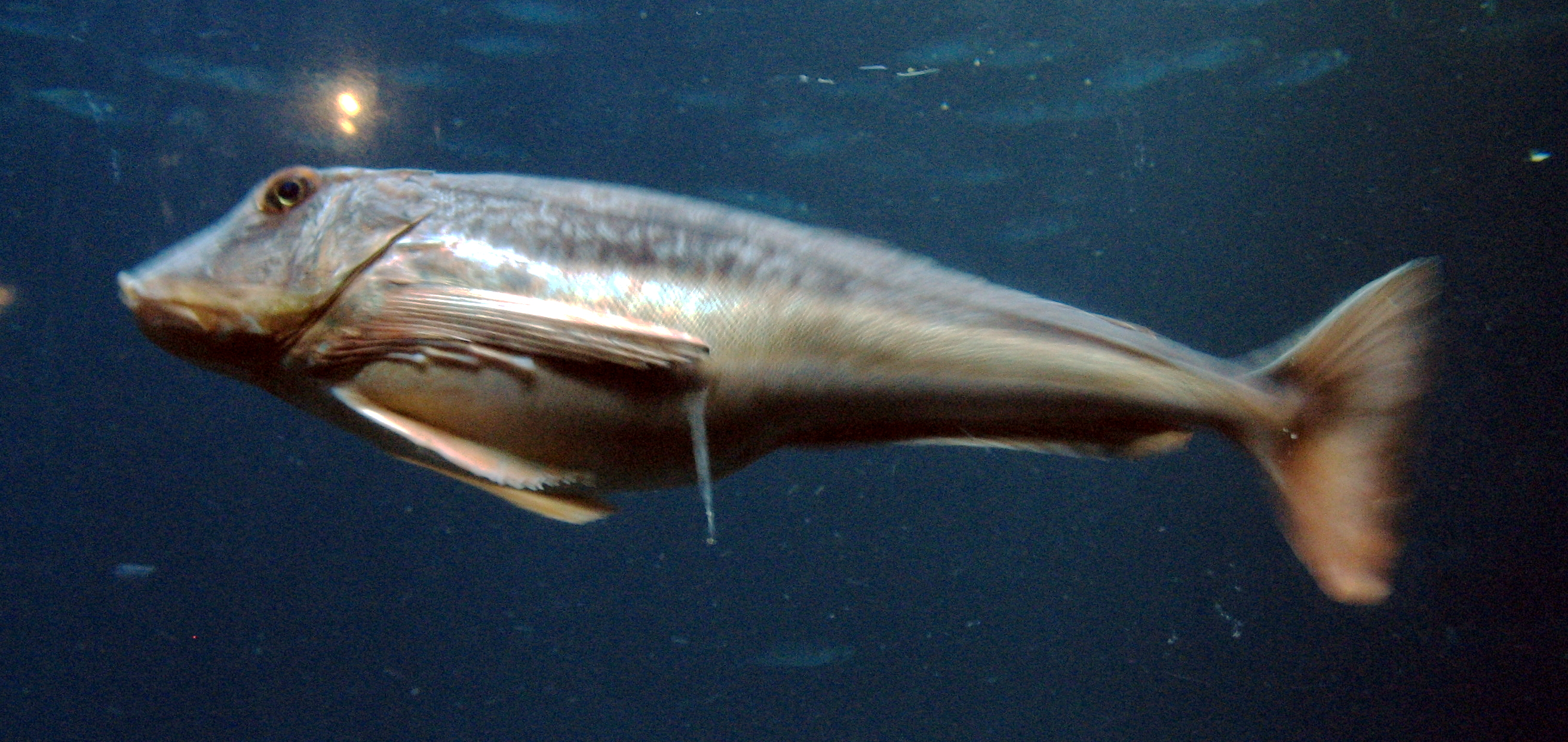 Chelidonichthys lucernus (Syn Trigla lucerna) in Aquarium Cinéaqua Map: 48° 51' 44" N 2° 17' 27" E